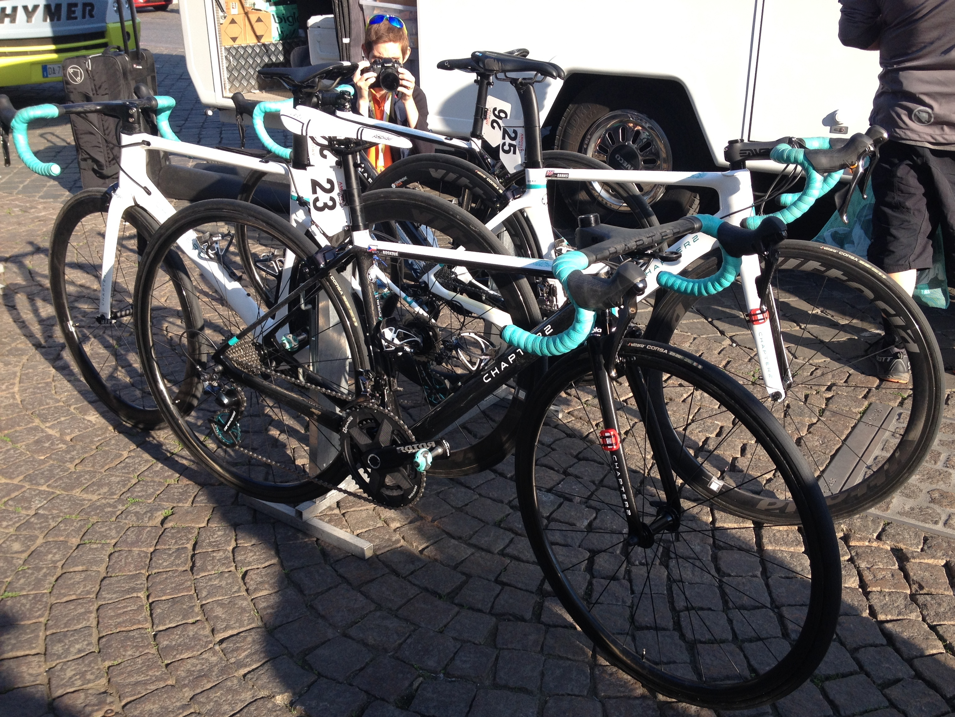 Start van de Amstel Gold Race Ladies Edition 2019 in Maastricht